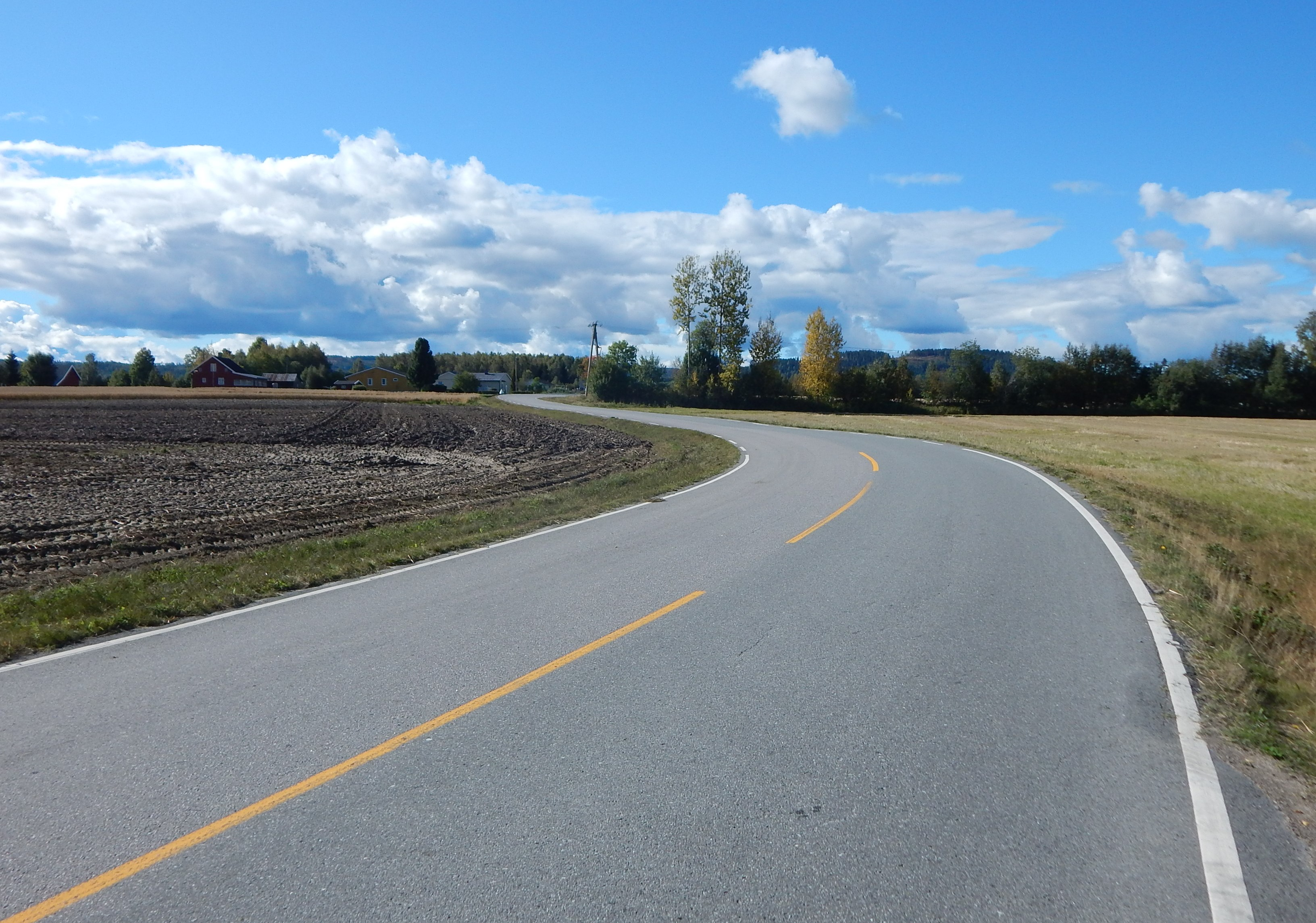 Nyjordvegen (fylkesvei 443) i østenden nær Væssiavegen (fylkesvei 210)